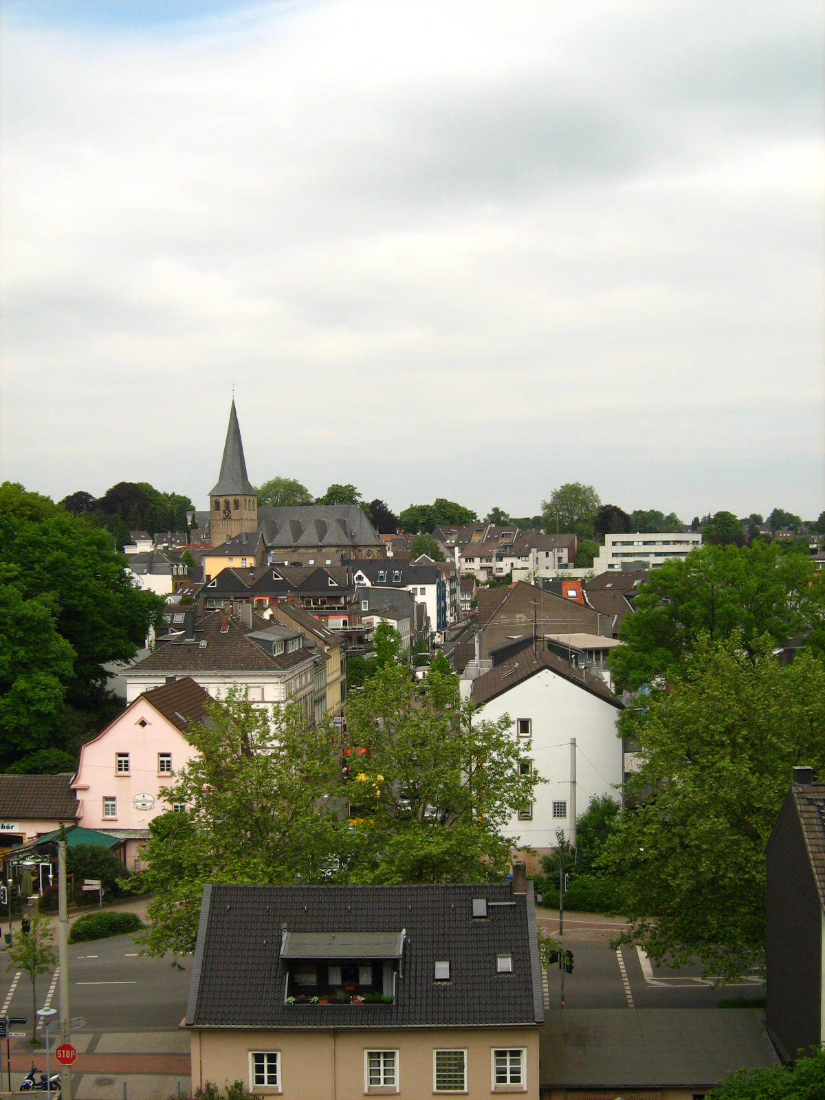 Blick auf Mettmann vom Bahnhof Mettmann Zentrum. Im Vordergrund das Haus Elberfelder Straße 2, dahinter die Breite Straße, im Hintergrund links St. Lambertus.